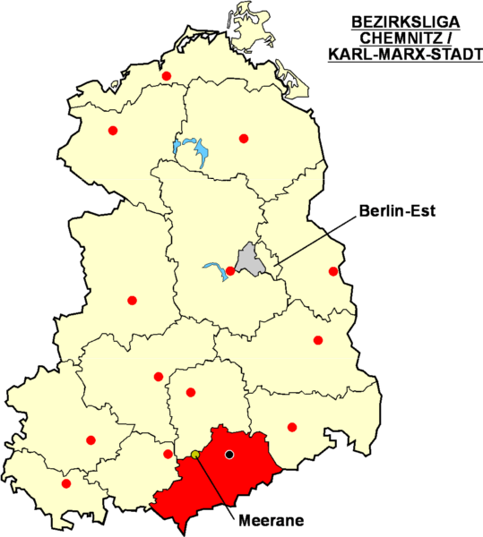 Localisation de Meerane dans la "Bezirksliga Chemnitz/Karl-Marx-Stadt" Catégorie:Logo de clubs de football - Allemagne